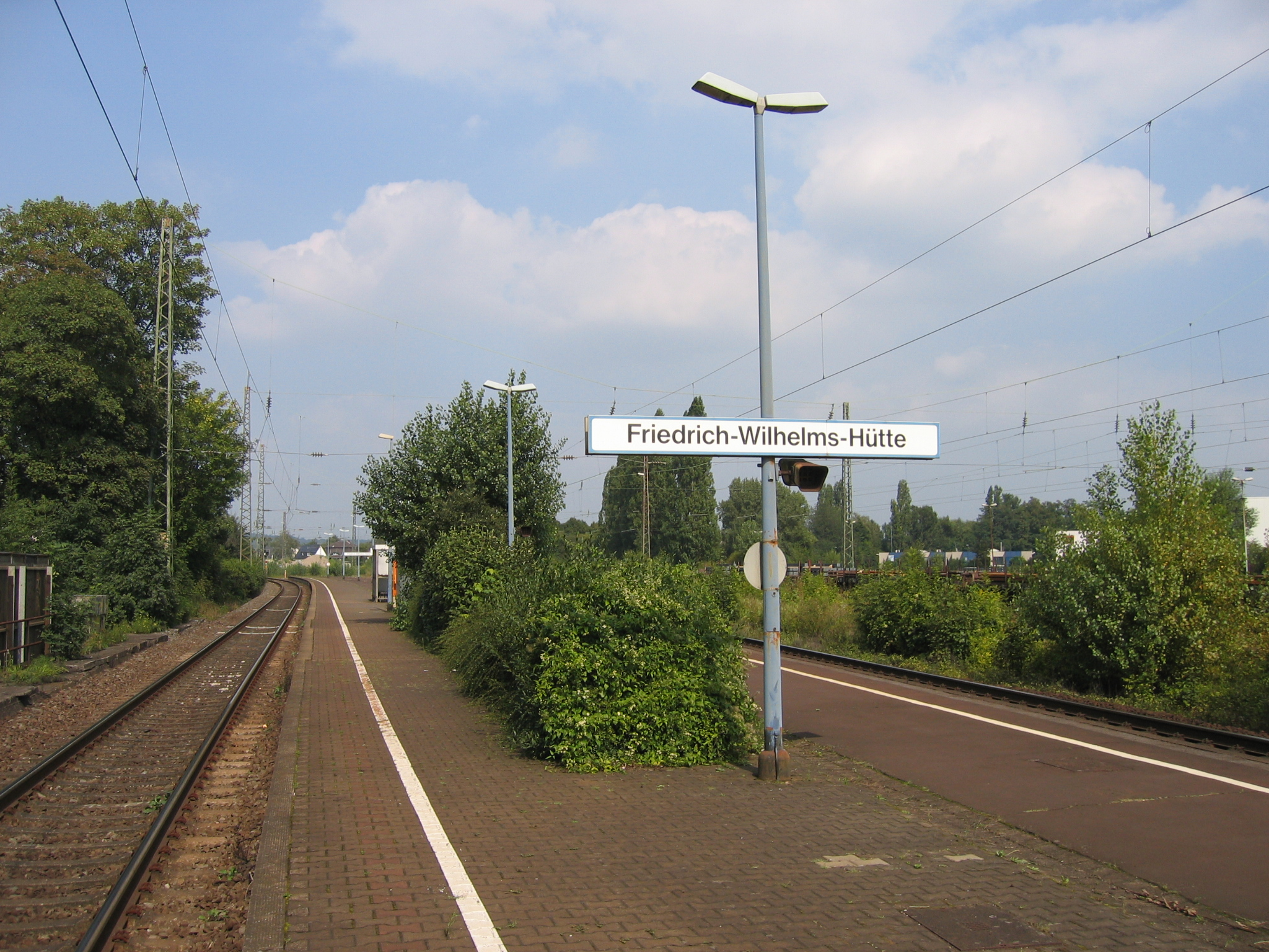 Bahnhof Friedrich-Wilhelms-Hütte, Troisdorf